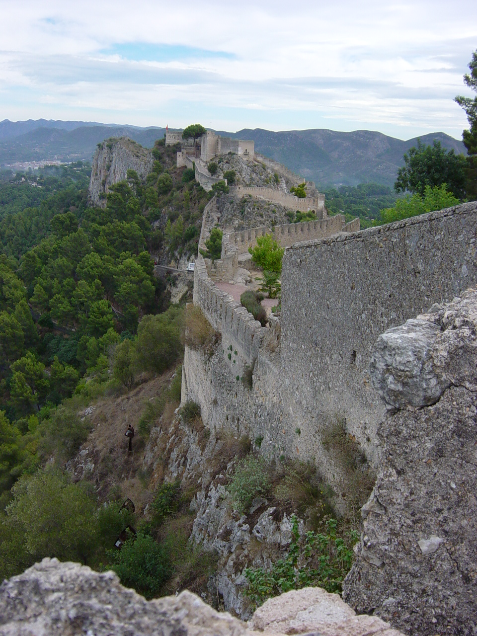 Teilansicht der Burg von Jativa